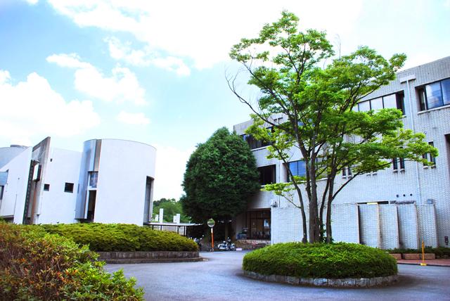 京都市立芸術大学は，1880年に日本初の公立の絵画専門学校として開設された京都府画学校を母体とする日本で最も長い歴史を持つ芸術大学です。 1889年に京都府画学校は市に移管され，その後，市立絵画専門学校，市立美術専門学校と変遷を経て，1950年に市立美術大学となります。一方，1952年にやはり全国初の公立音楽大学として京都市立音楽短期大学が設置されます。この二つの大学が1969年に統合され，京都市立芸術大学となりました。 2000年には歴史文化都市・京都にふさわしい日本伝統音楽の研究機関として日本伝統音楽研究センターを設置し，２学部・１研究所という今日の体制になりました。 美術と音楽を両軸とする本学は，文化首都・京都に蓄積された豊かな美の伝統を背景に，建学以来130年以上にわたって，国内外の芸術界・産業界で活躍する優れた人材を輩出し，わが国のみならず世界の芸術文化に貢献しています。